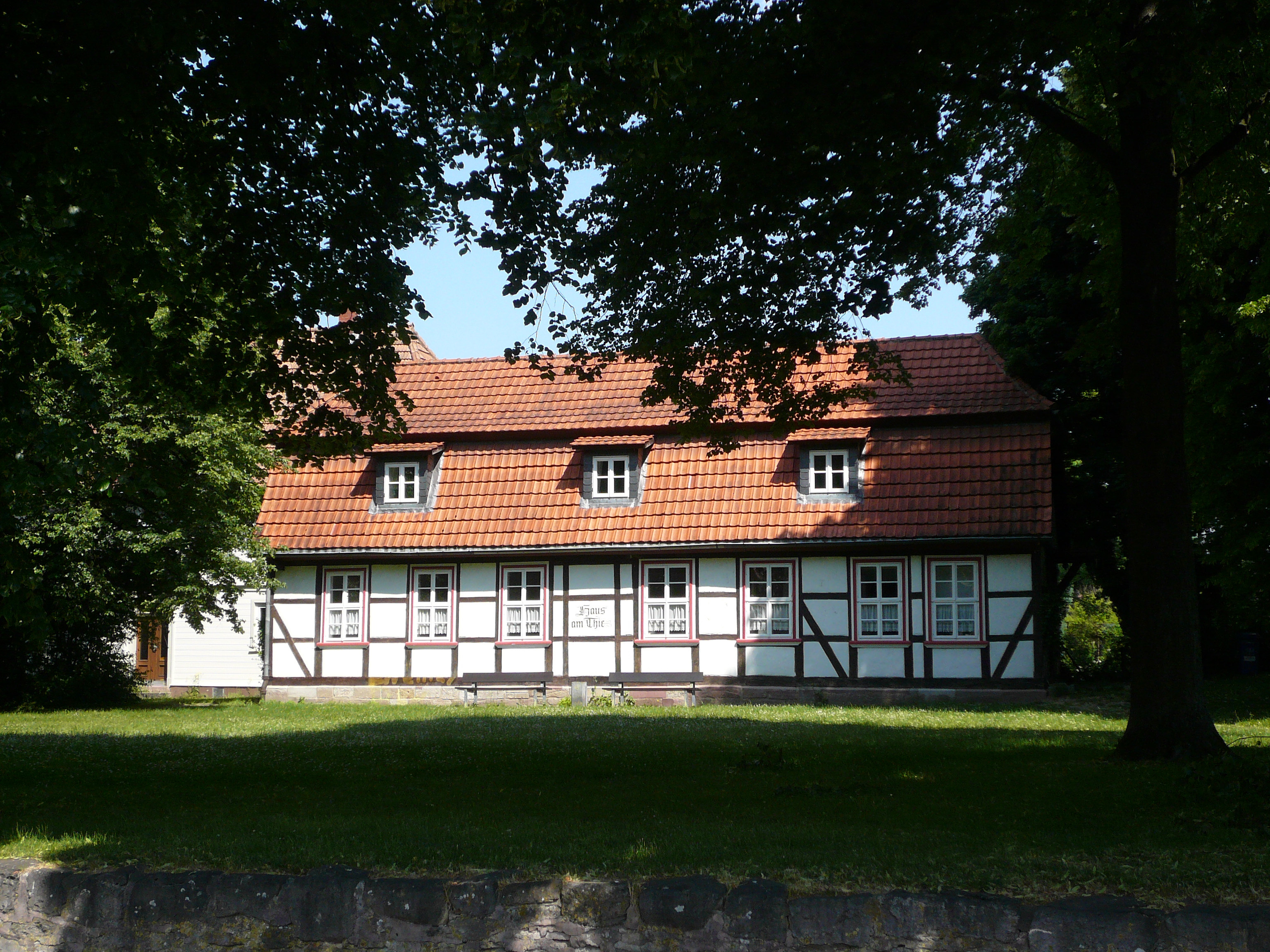 Thiehaus in der Breiten Straße 17/19 in Weende, Stadt Göttingen, Südniedersachsen, erbaut Ende 18. Jahrhundert. Ansicht von Süden